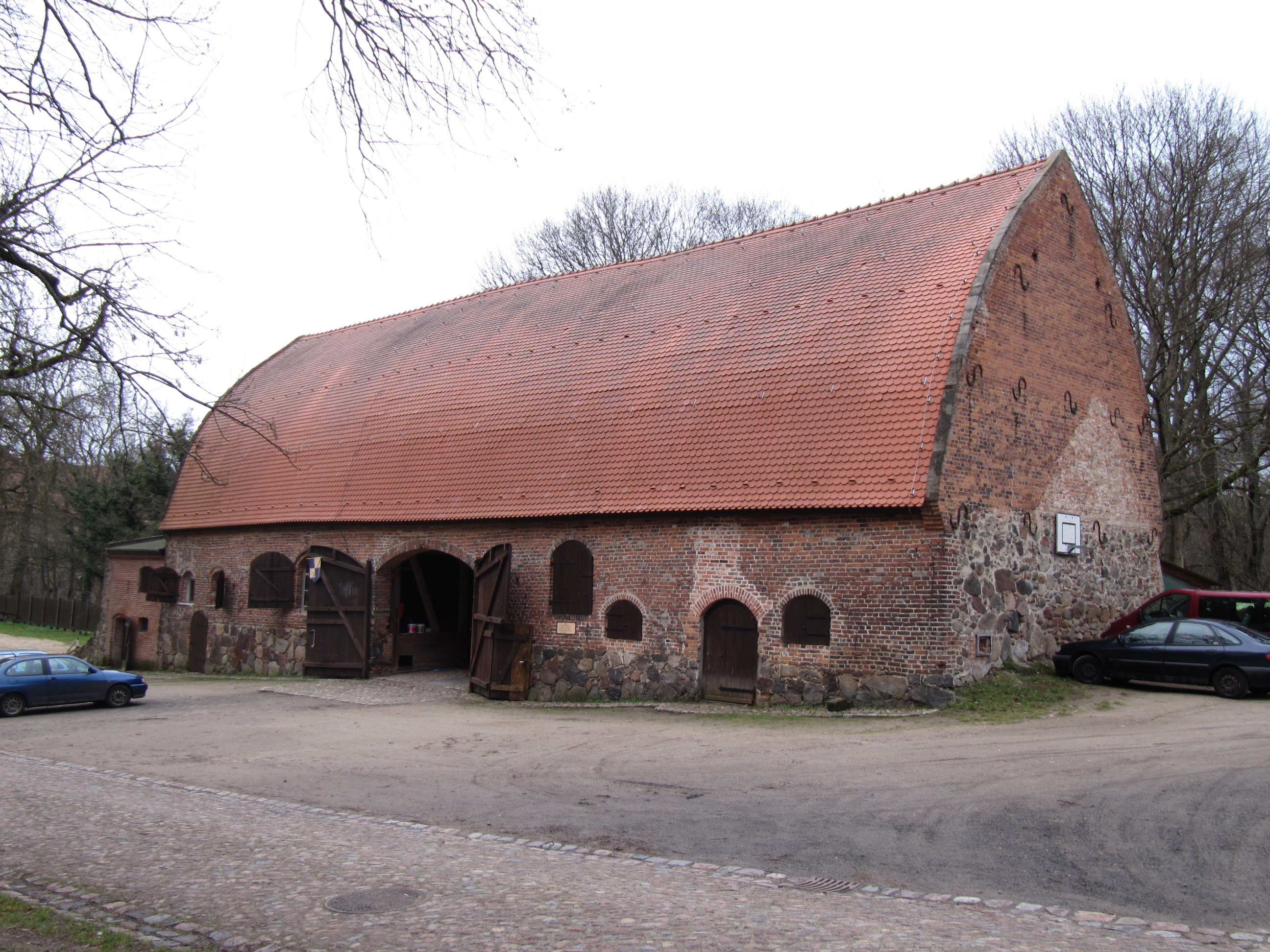 scheune burg rabenstein (fläming)